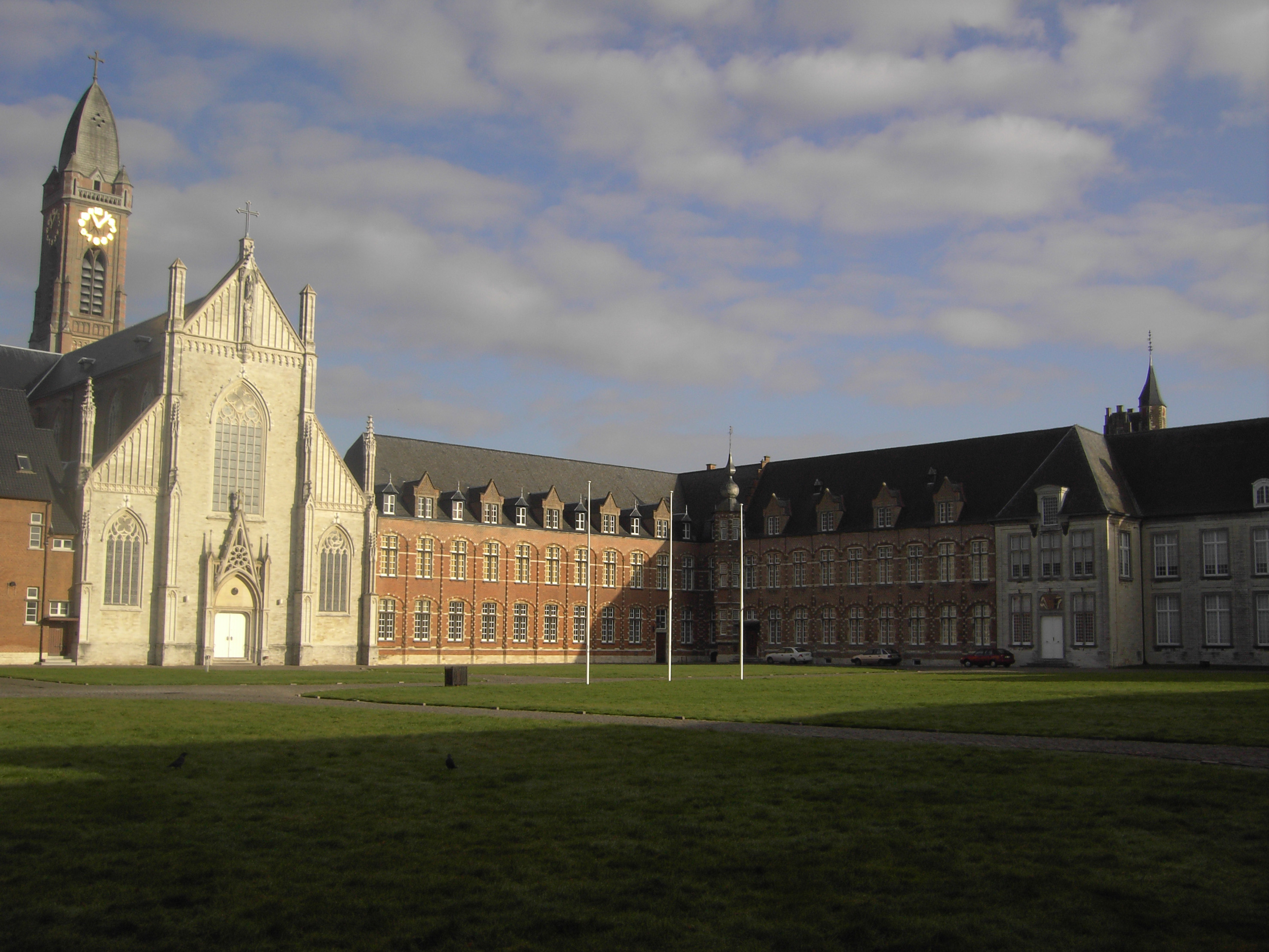 Tongerlo - Abdijkerk (Westerlo)